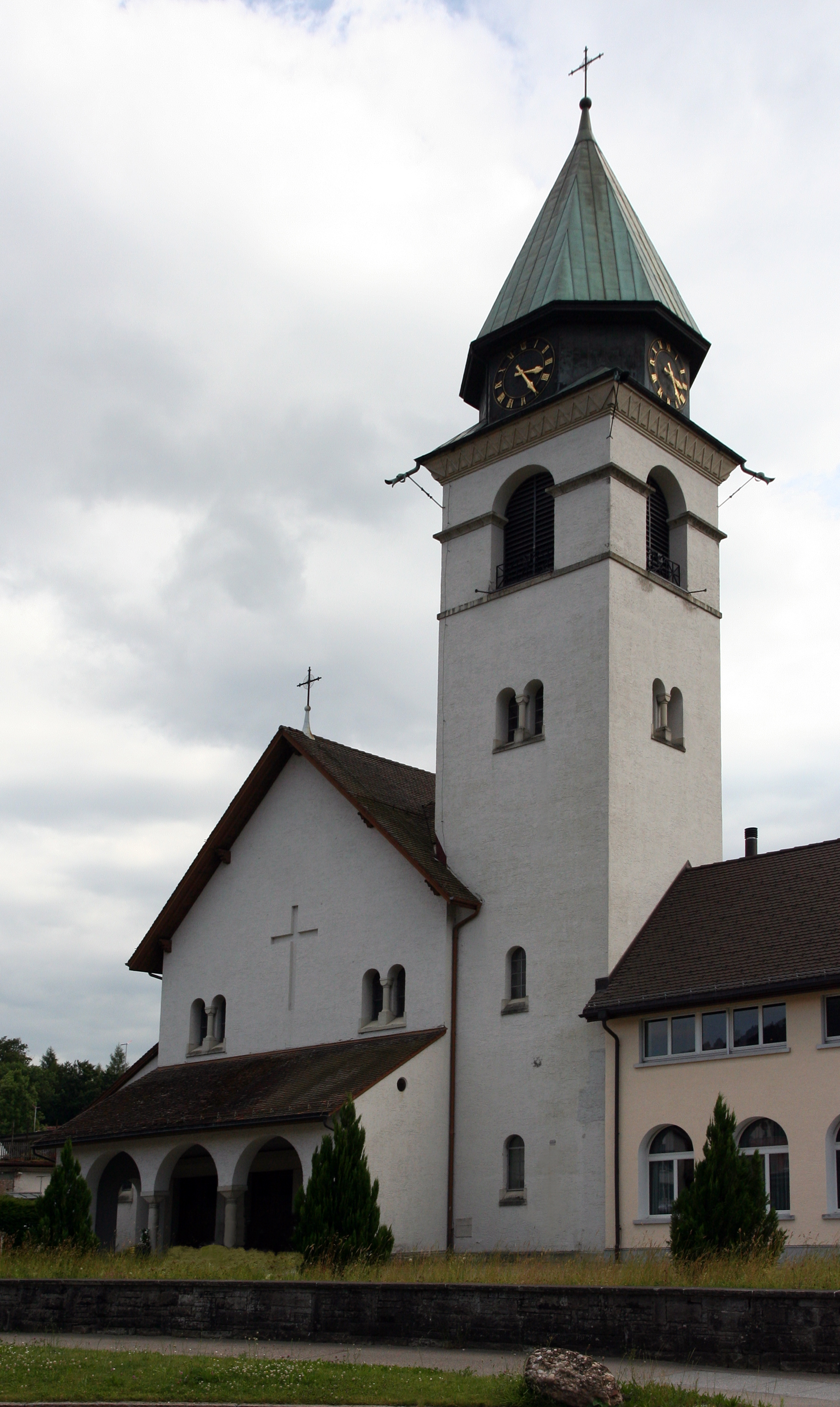 Römisch-katholische Pfarrkirche St. Margareten Wald ZH